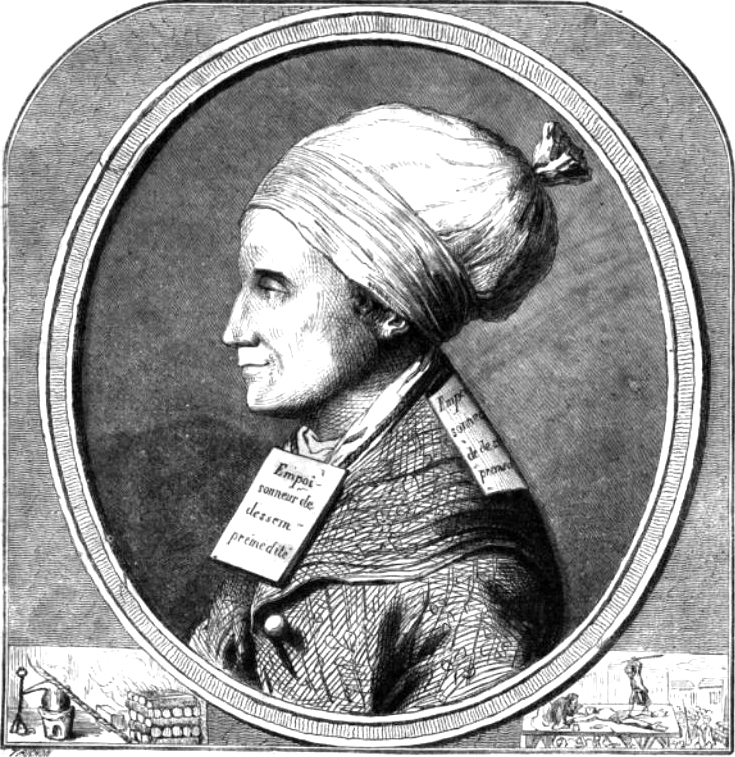 Portrait of Antoine-François Desrues (1744-1777), French criminal